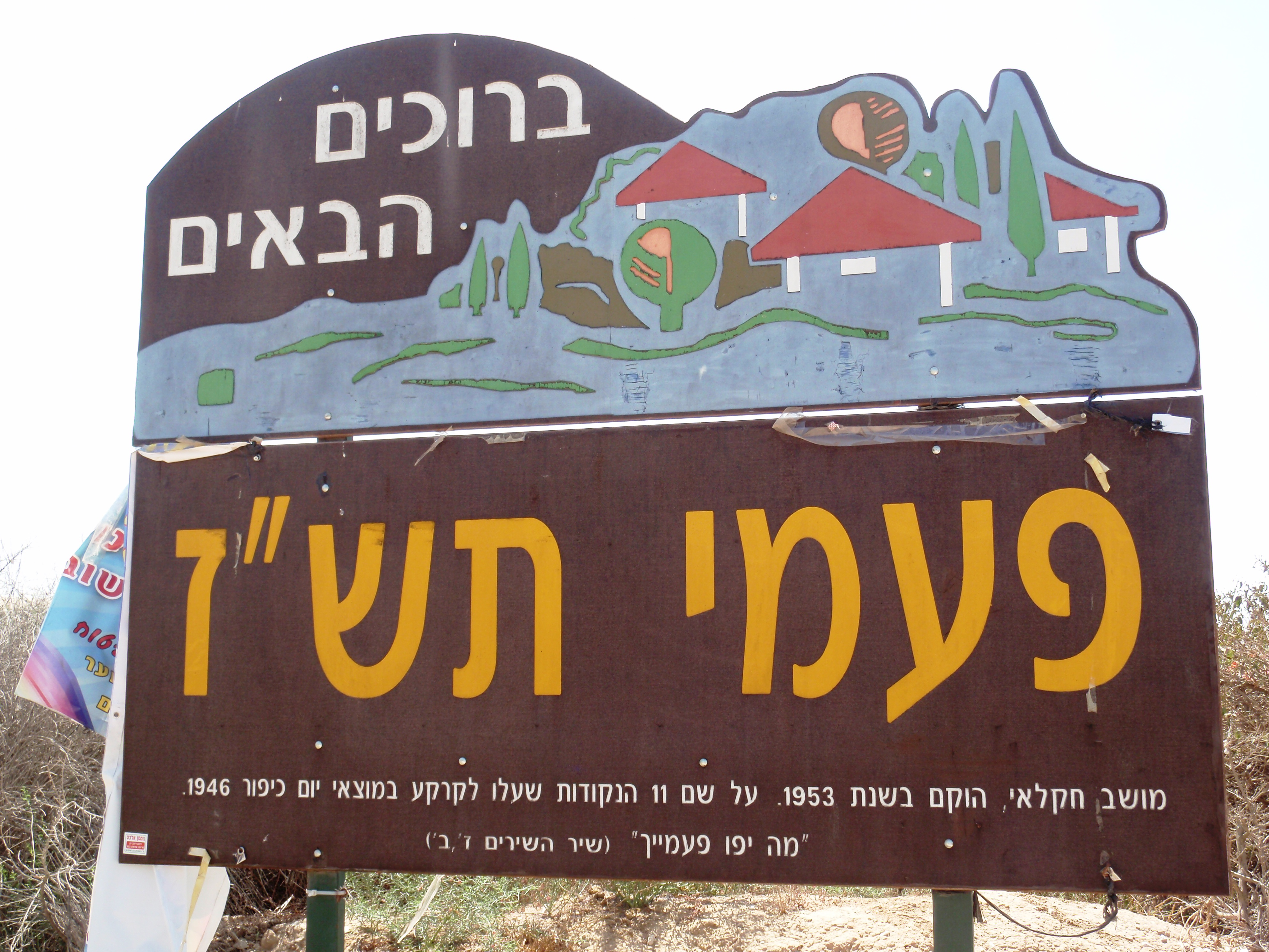 Moshavim פעמי תש"ז הכניסה למושב